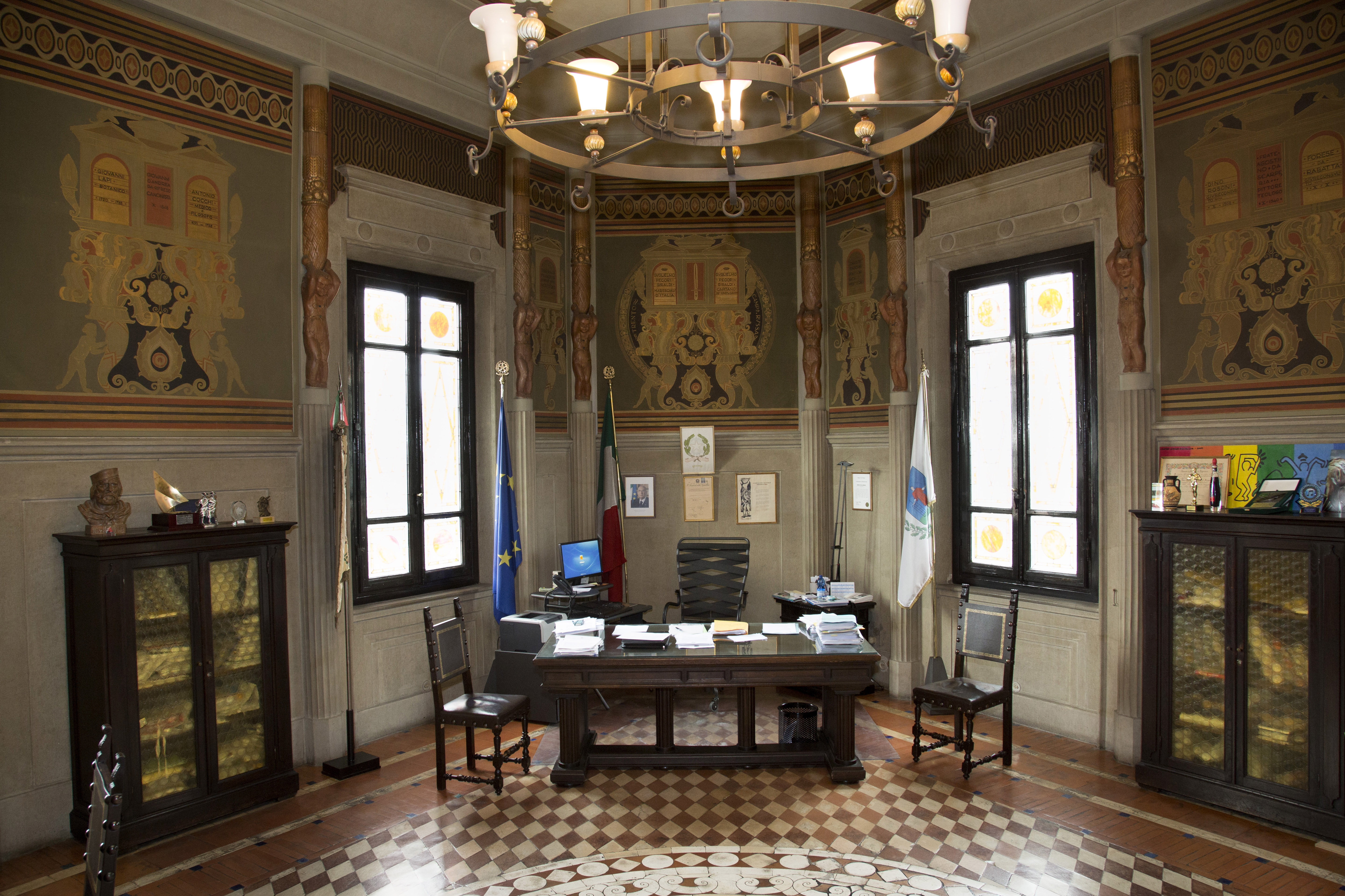 Tito Chini. particolare della decorazione della stanza del Sindaco Palazzo comunale di Borgo San Lorenzo